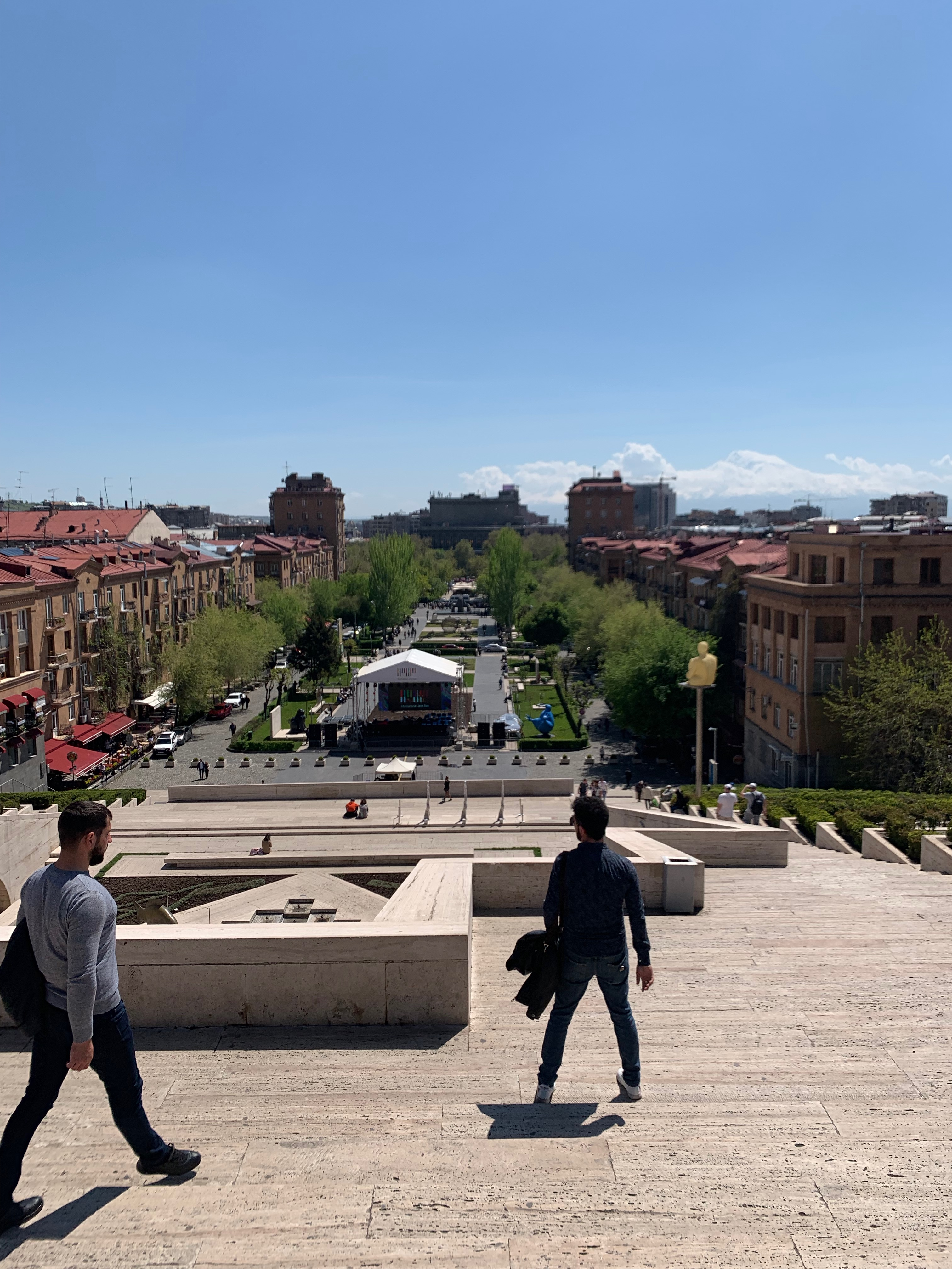 Вид с Каскада на горы Армении